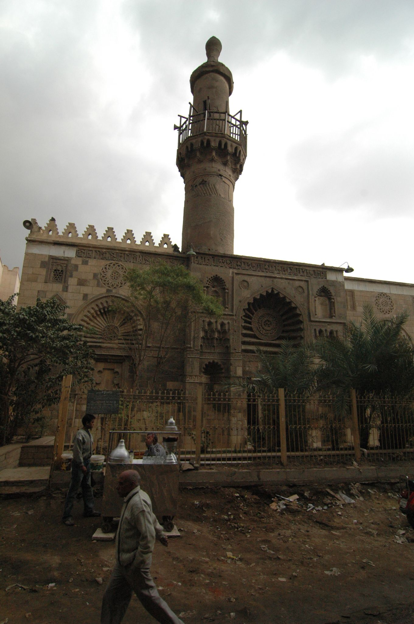 Cairo: moschea di el-Akhmar